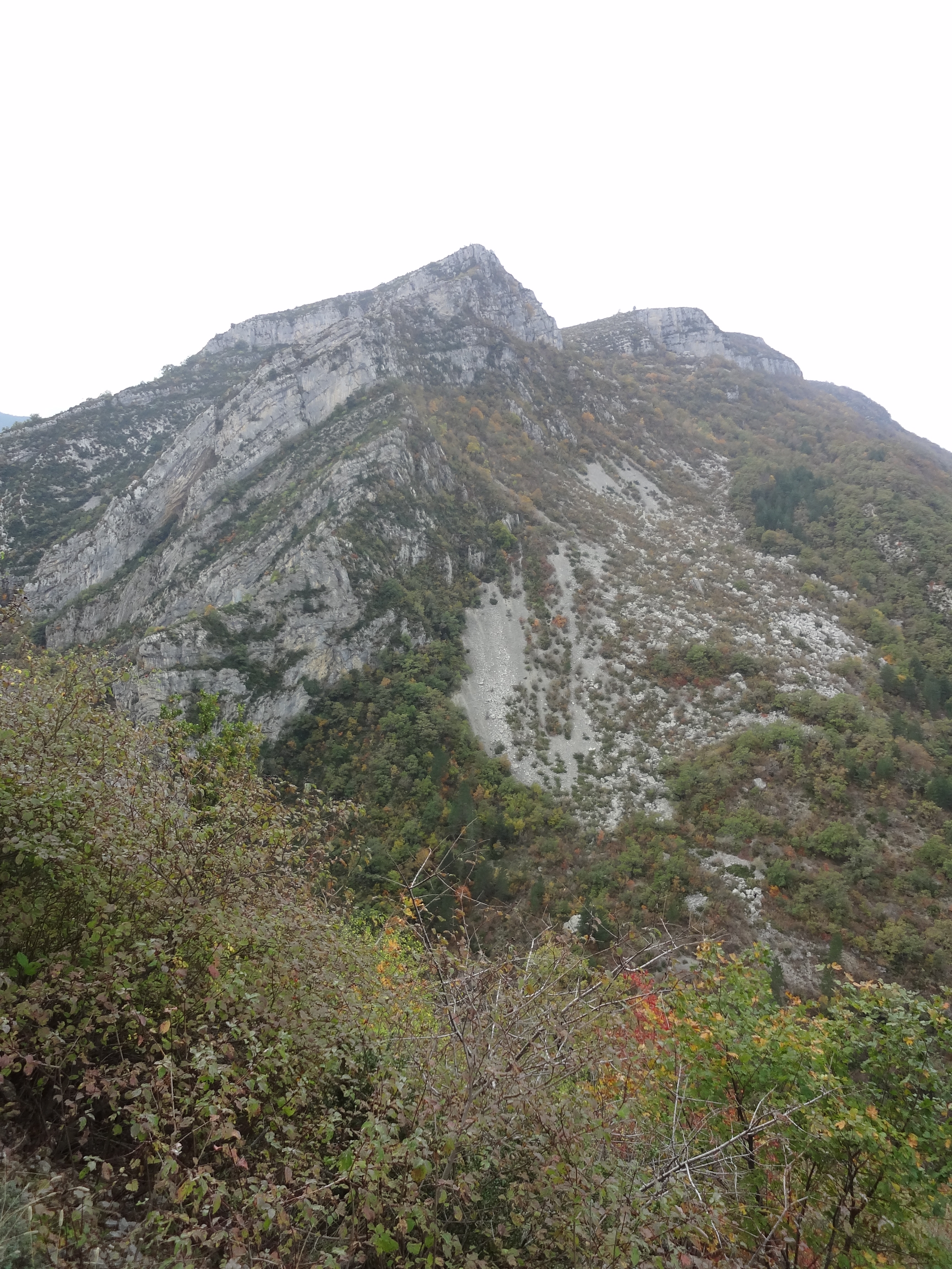 Extrémité est de la Montagne de Sumiou (1179 m à cet endroit)